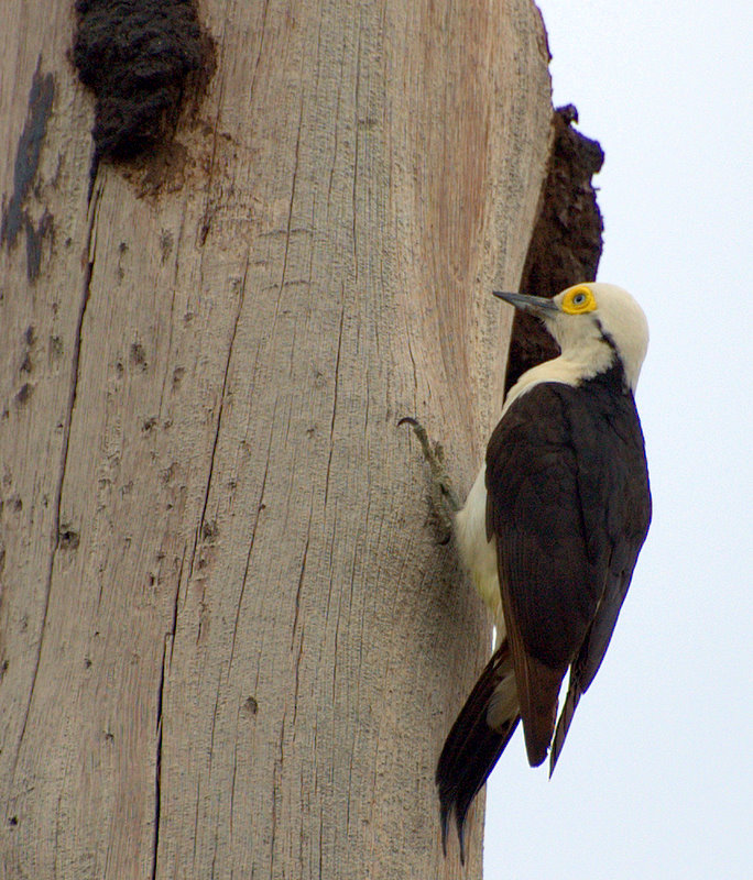 Melanerpes candidus Piraju-SP - Estrada velha Piraju / Sarutaiá, próximo ao Sitio João Arruda...